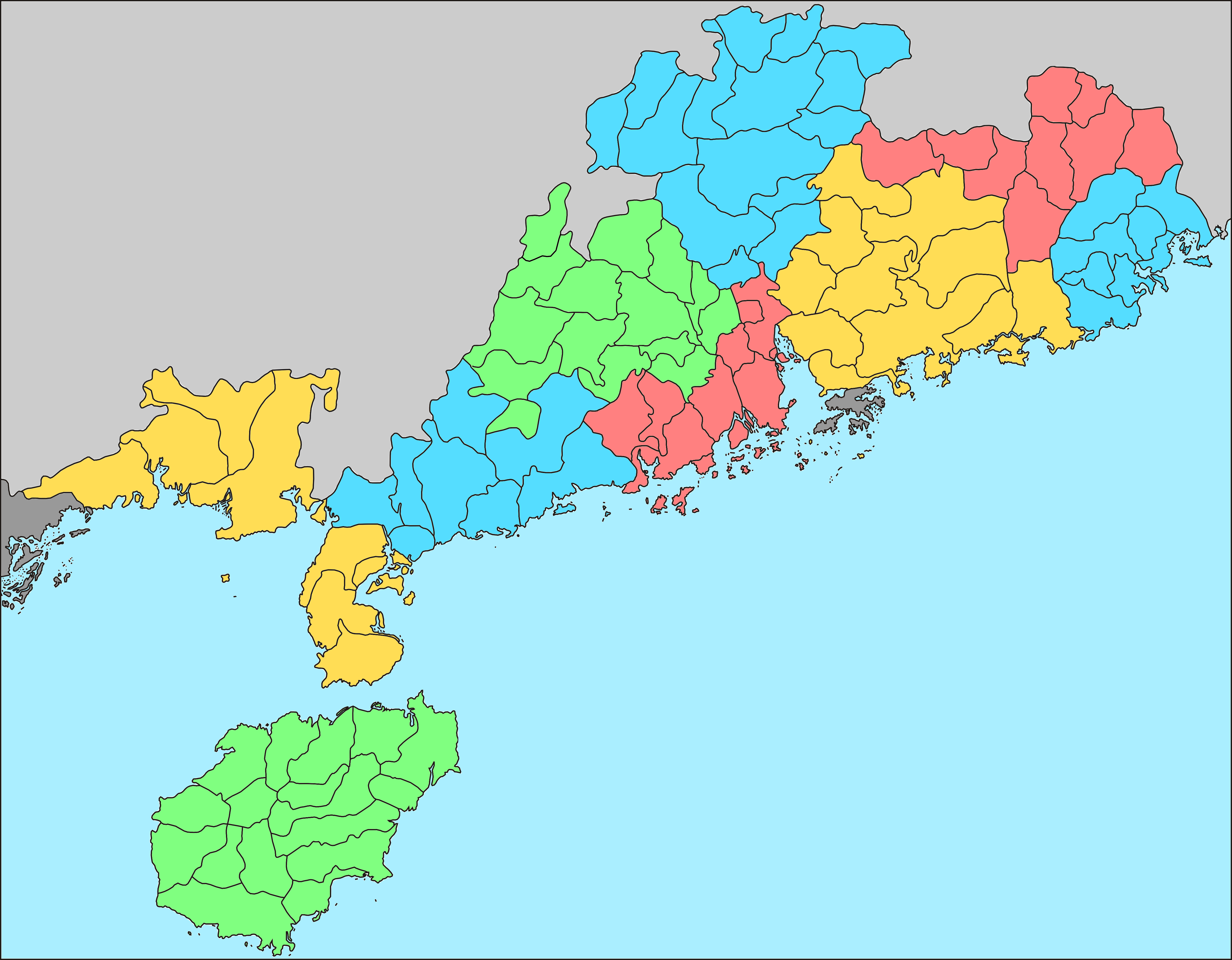 中文（中国大陆）: 1946年广东省行政督察区